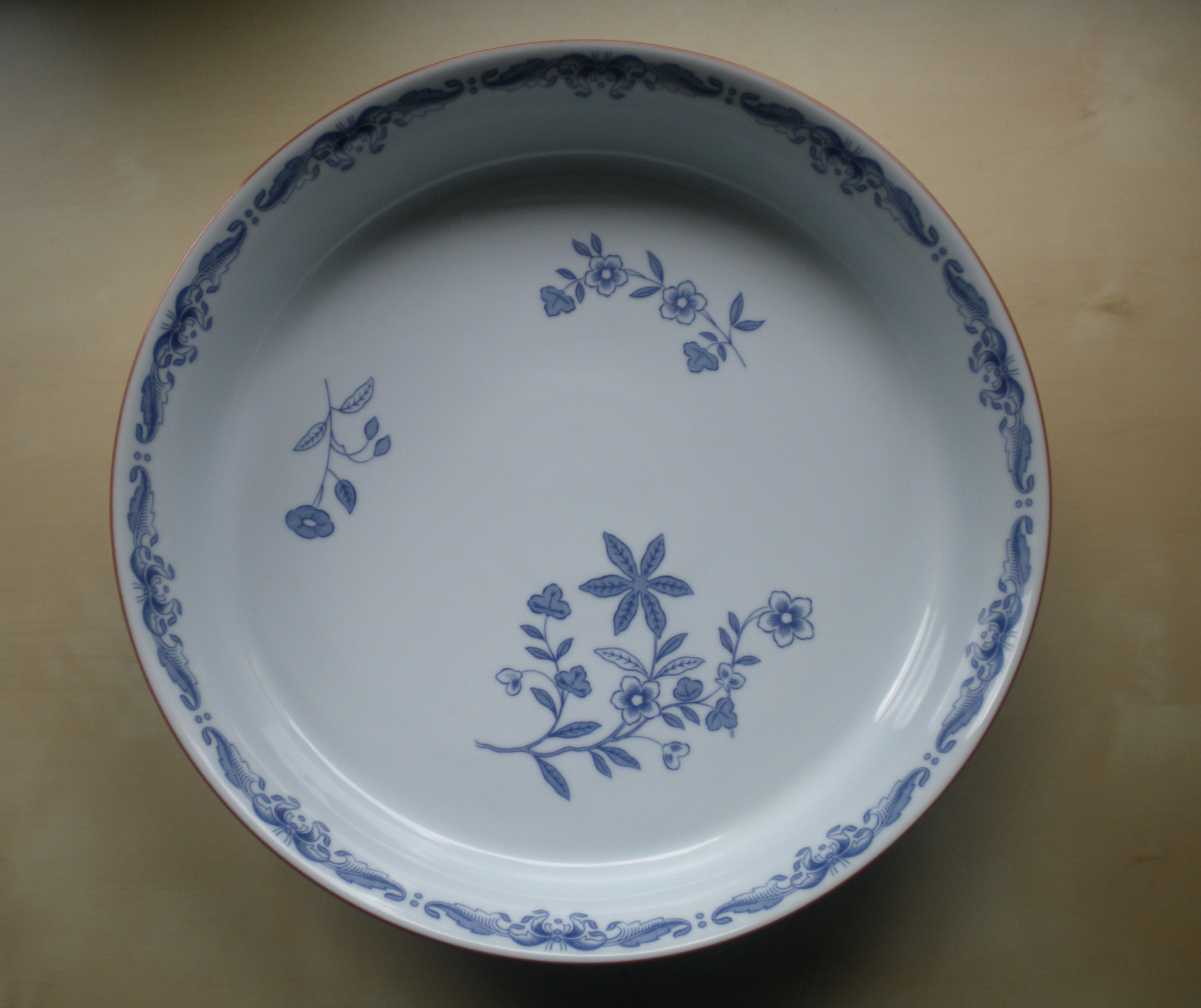 Ungsform från Rörstrands porslinsfabriks "Ostindia" anno 2012.